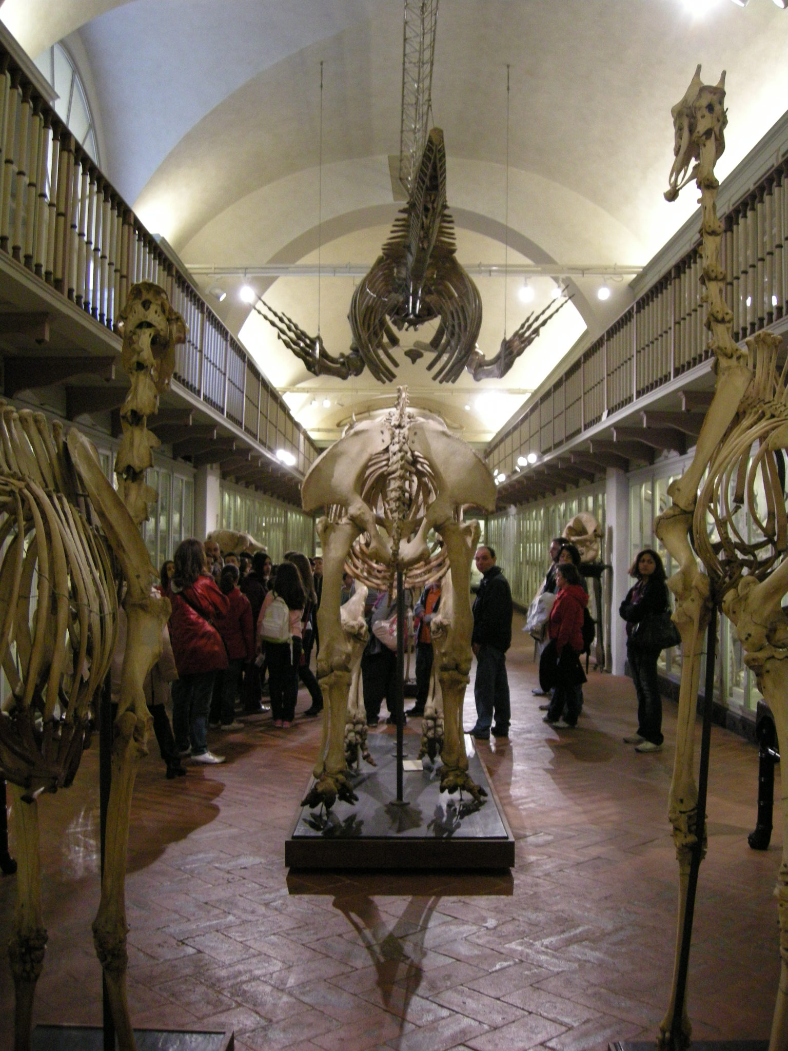 Specola, sala degli scheletri